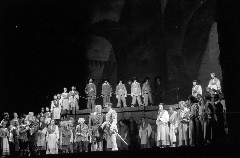 Original image description from the Deutsche Fotothek Szenenbilder